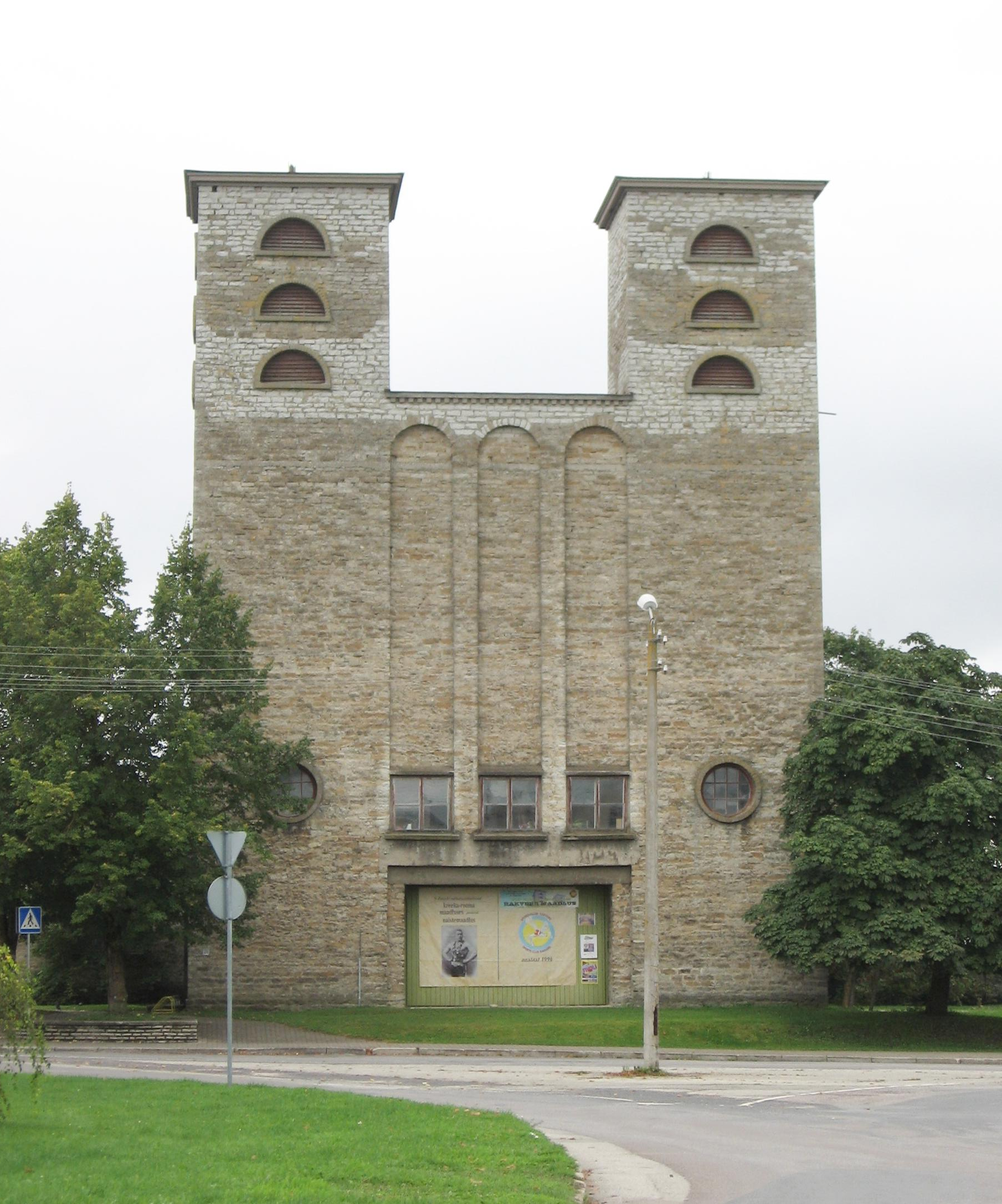 Rakvere Pauluse kirik